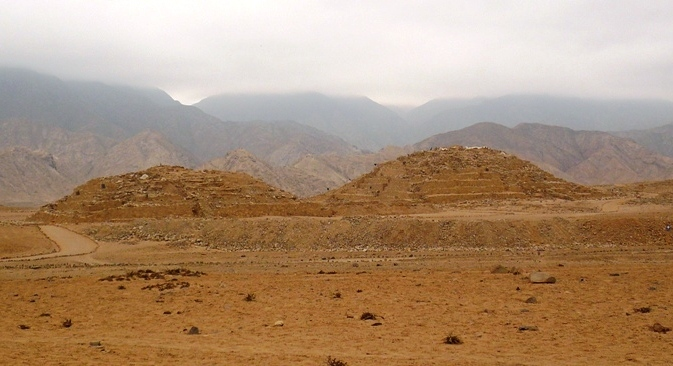 Paisaje donde se puede divisar dos de las pirámides de Caral